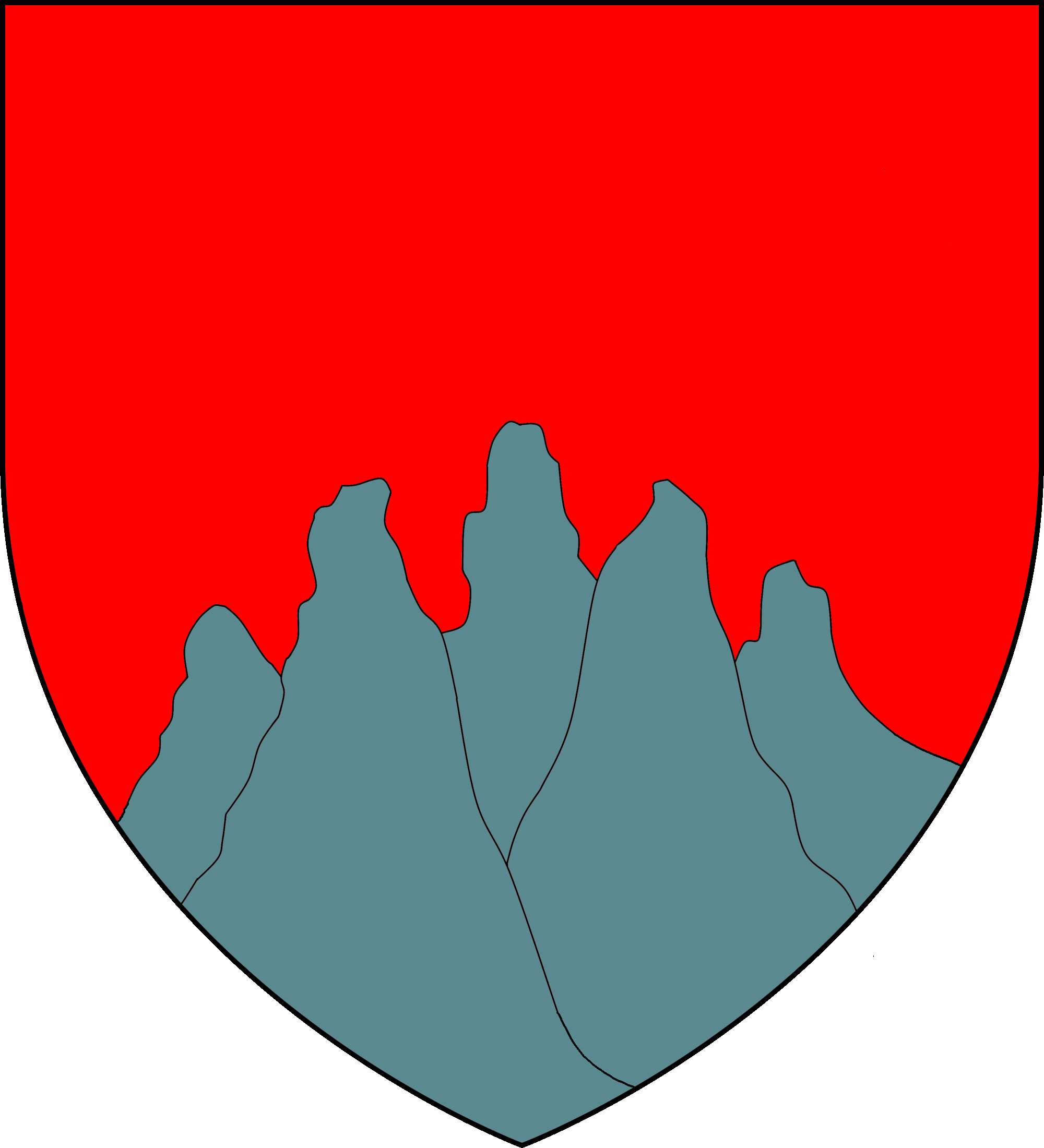 Blasón de la Casa de Chiaromonte